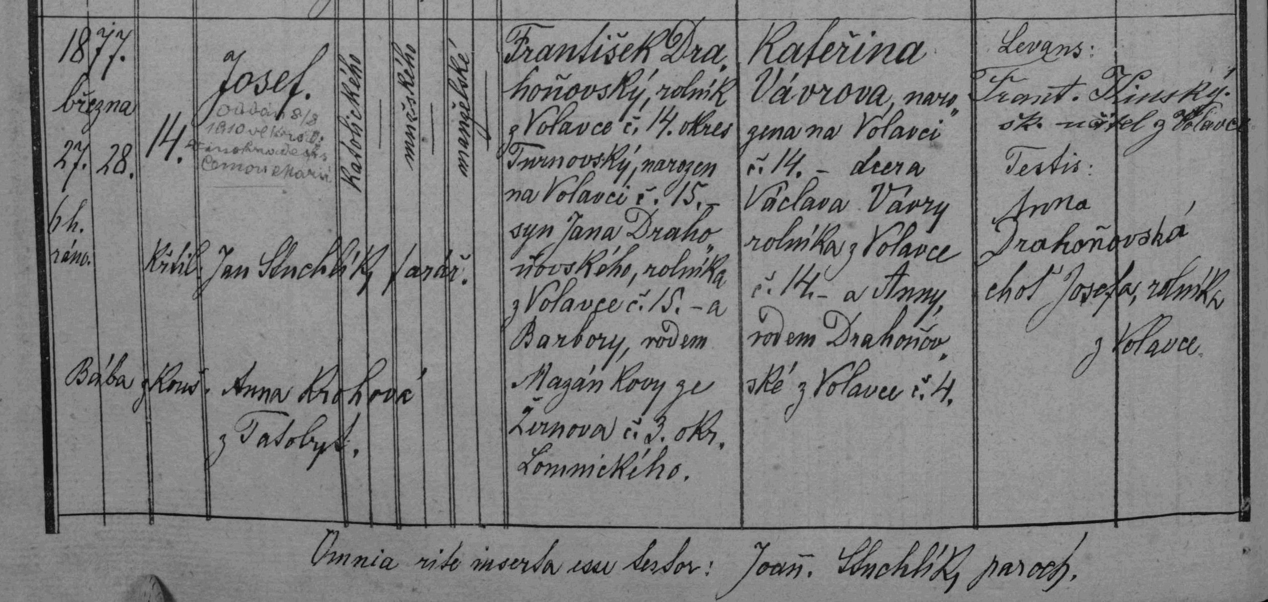 matriční zápis o narození a křtu Josefa Drahoňovského (matrika N index N 1838-1889 Volavec (SOA Zámrsk))